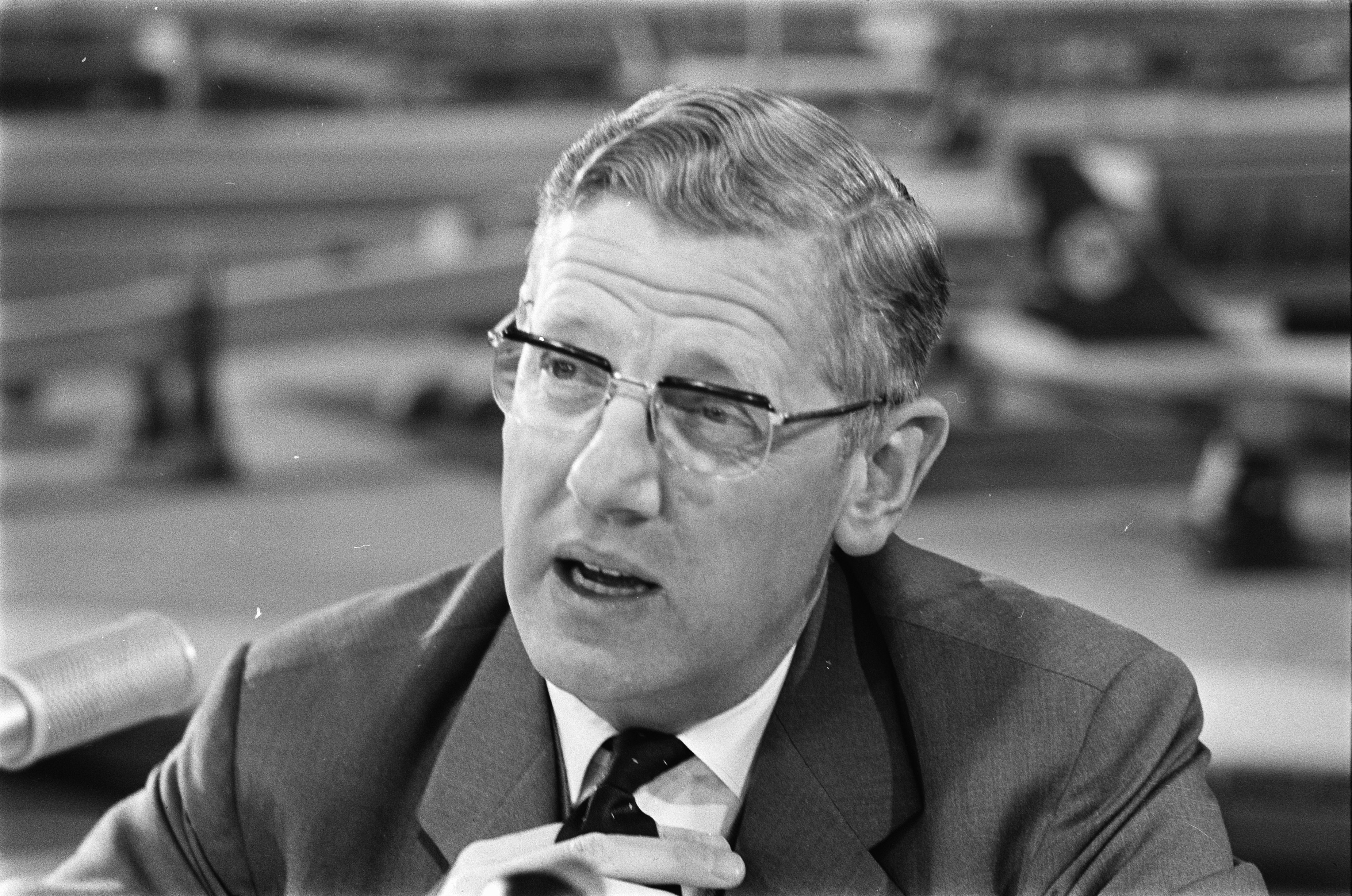 Collectie / Archief : Fotocollectie Anefo Reportage / Serie : [ onbekend ] Beschrijving : Minister van Ontwikkelingshulp Udink op Schiphol Datum : 18 november 1969 Locatie : Noord-Holland, Schiphol Trefwoorden : ministers Persoonsnaam : Udink, Berend-Jan Fotograaf : Koch, Eric / Anefo Auteursrechthebbende : Nationaal Archief Materiaalsoort : Negatief (zwart/wit) Nummer archiefinventaris : bekijk toegang 2.24.01.05 Bestanddeelnummer : 922-9842